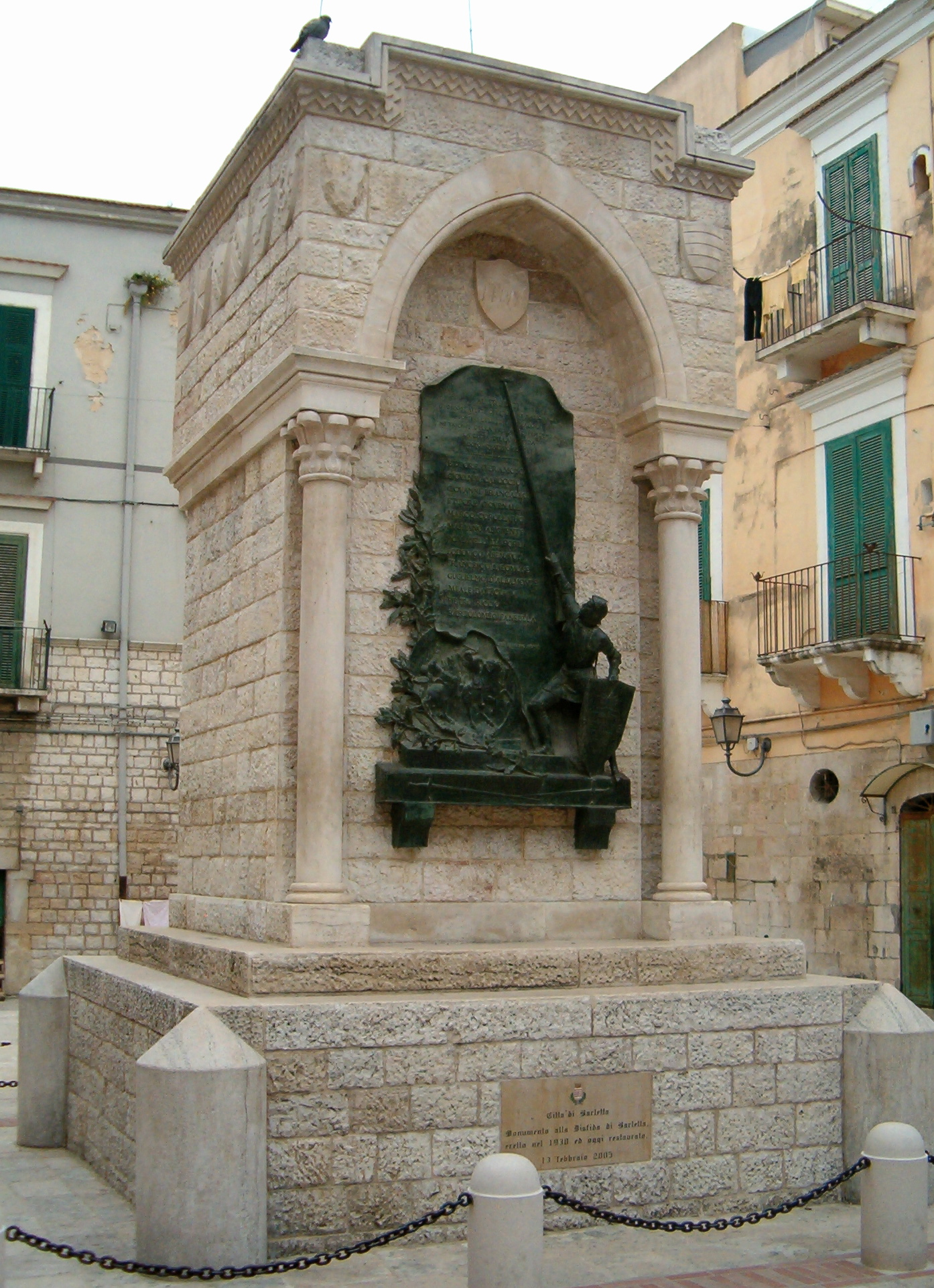 Barletta (Puglia, Italy). Monumento alla Disfida di Barletta.